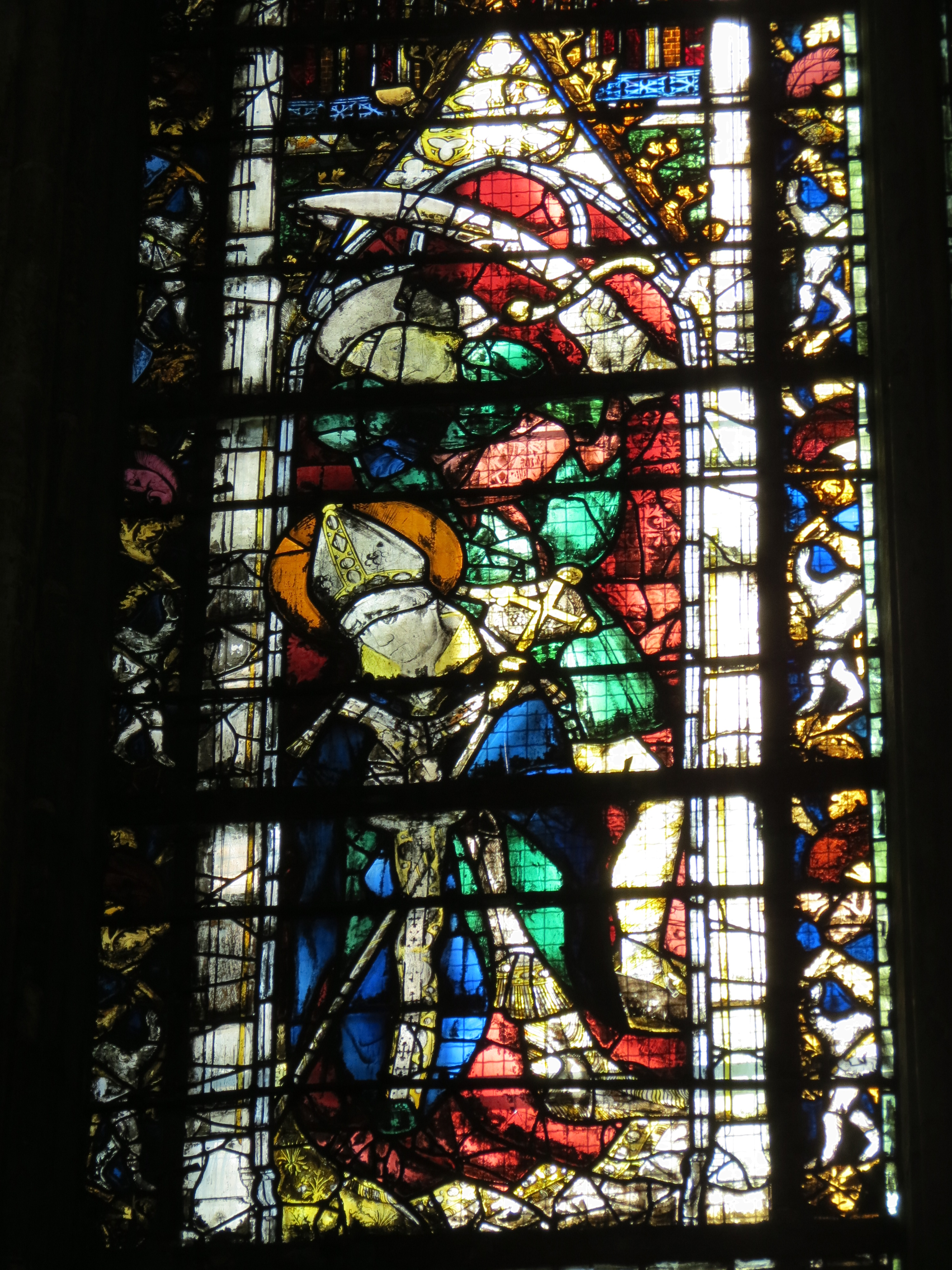 Vitrail de Saint-Prétextat, réalisé en 1463 par Guillaume Barbe.